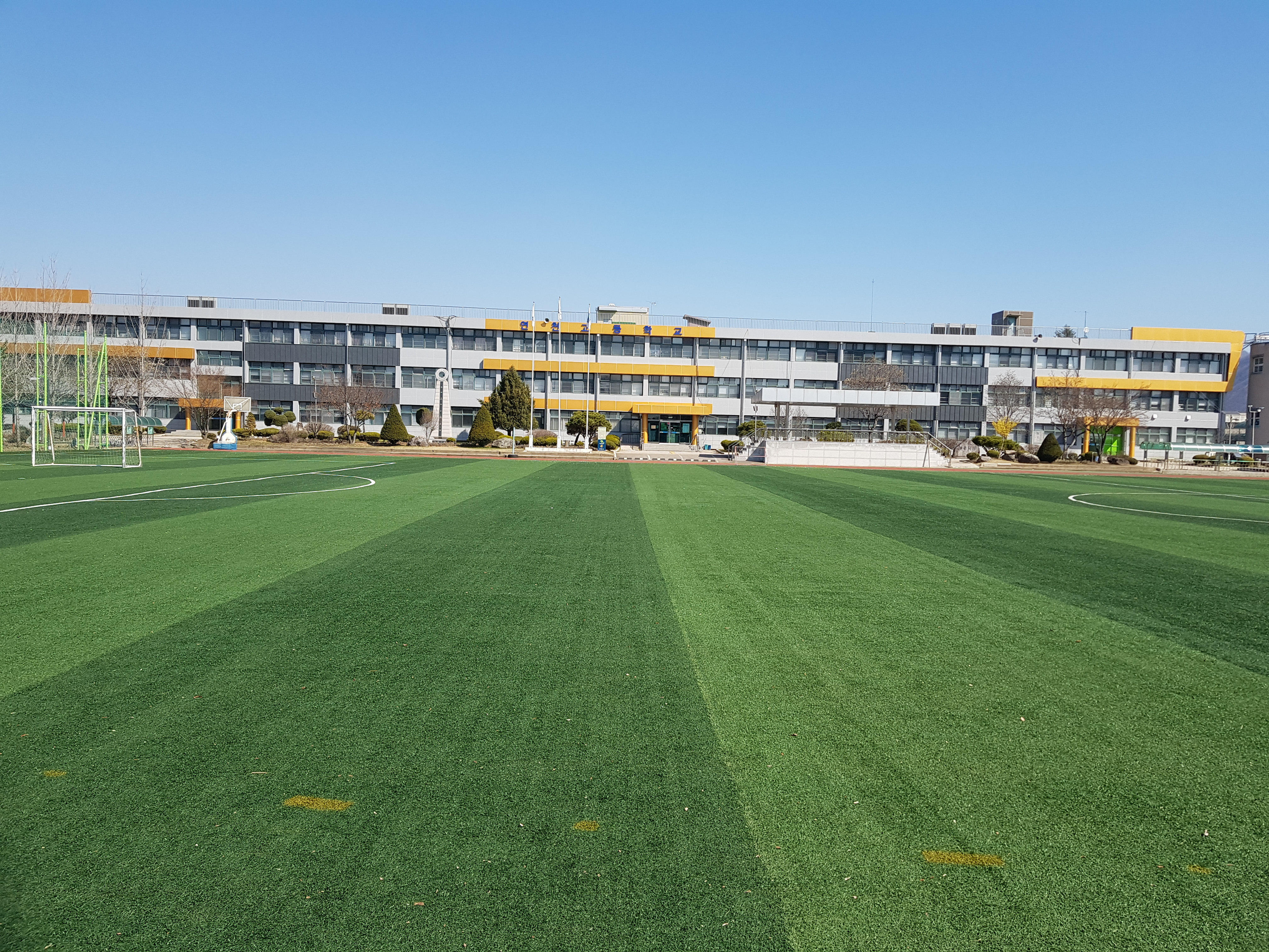 연천고등학교 최근 사진입니다